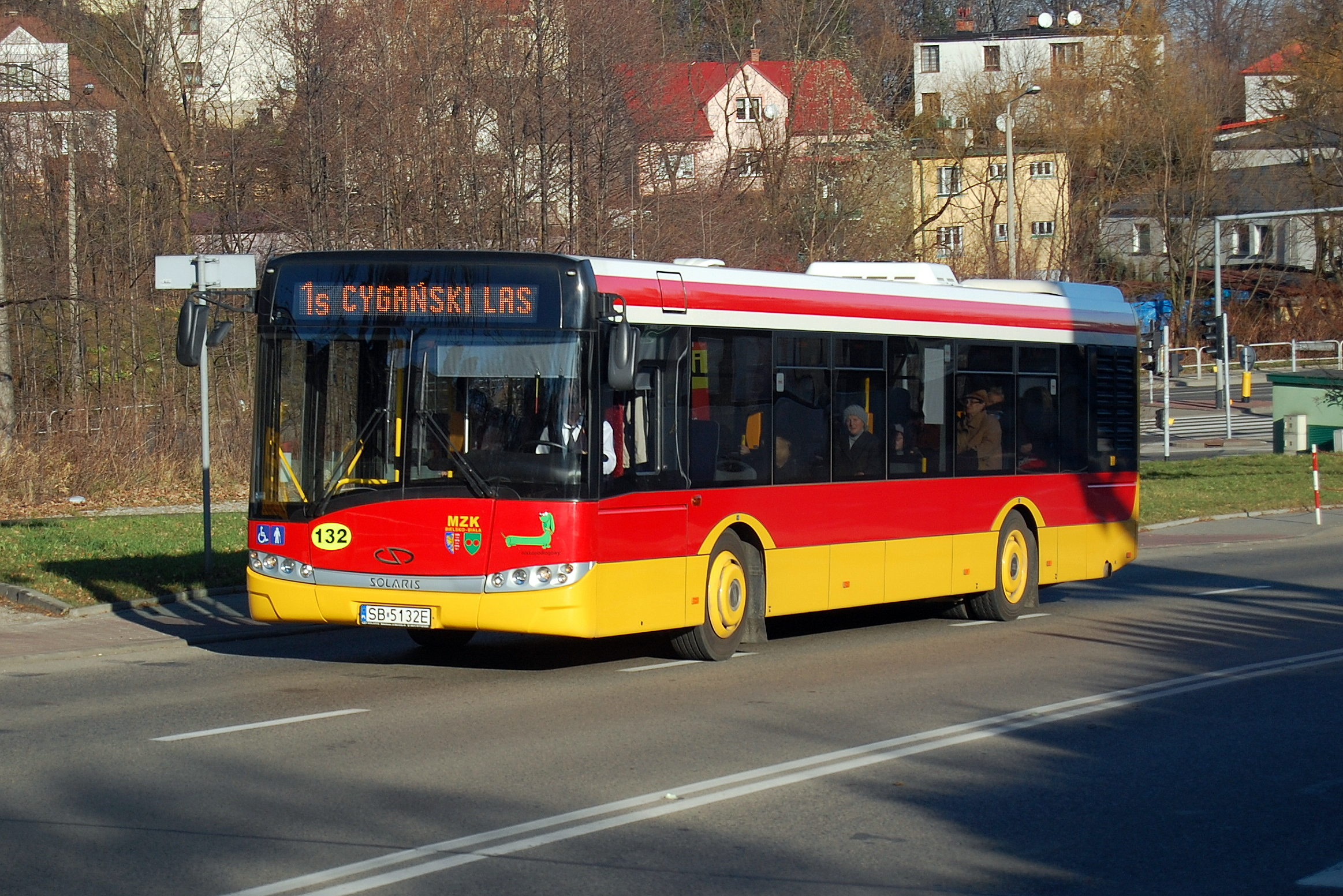 Solaris Urbino 12 W69 (#132) z 2009 roku na al. Armii Krajowej w Bielsku-Białej. Należy do MZK Bielsko-Biała.